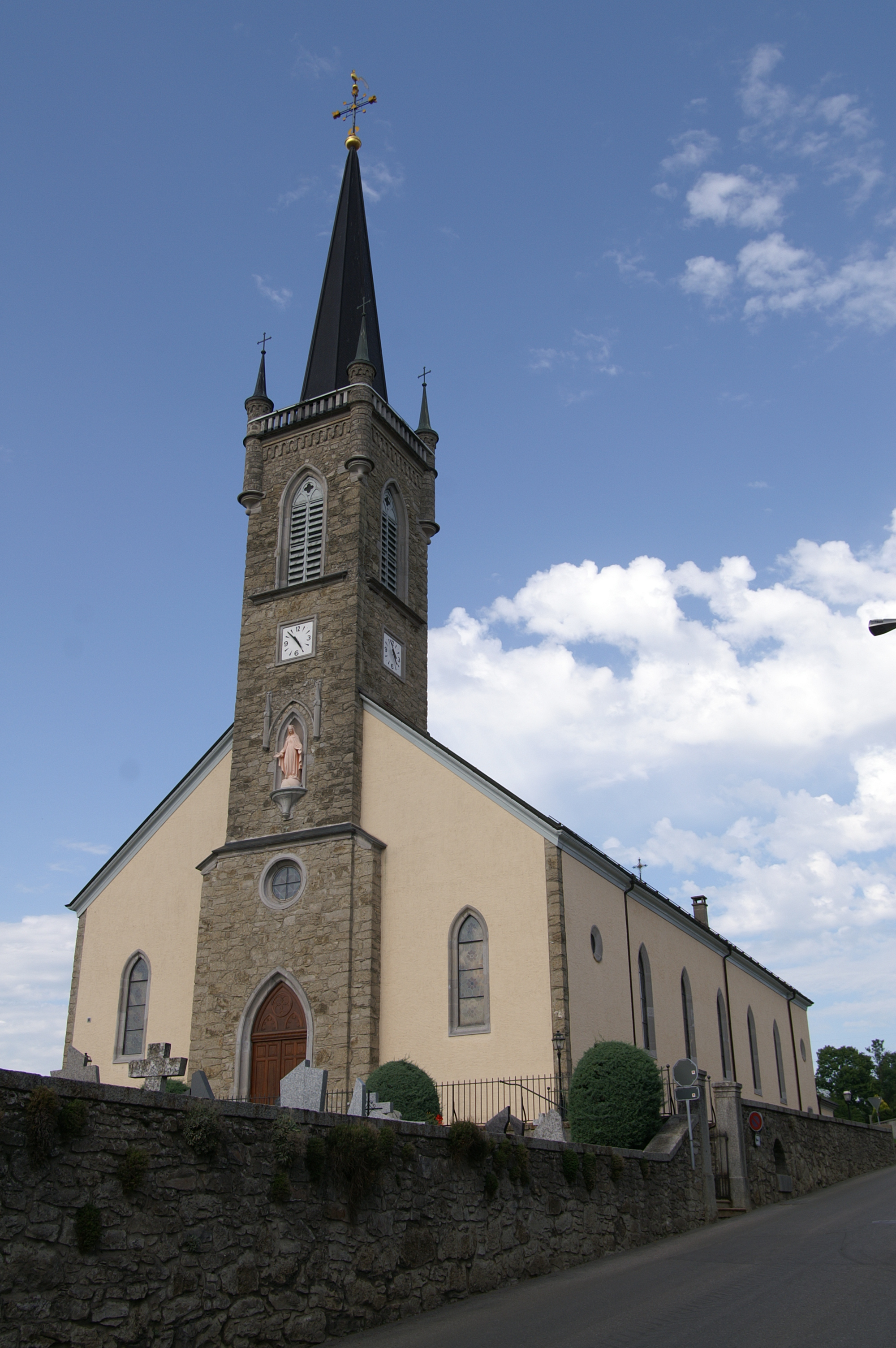 Église Notre-Dame d'Attalens.